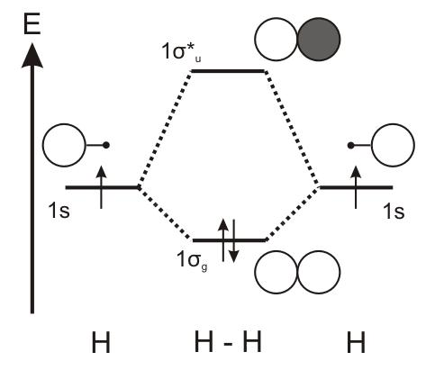 Diagramme d'OM du dihydrogène